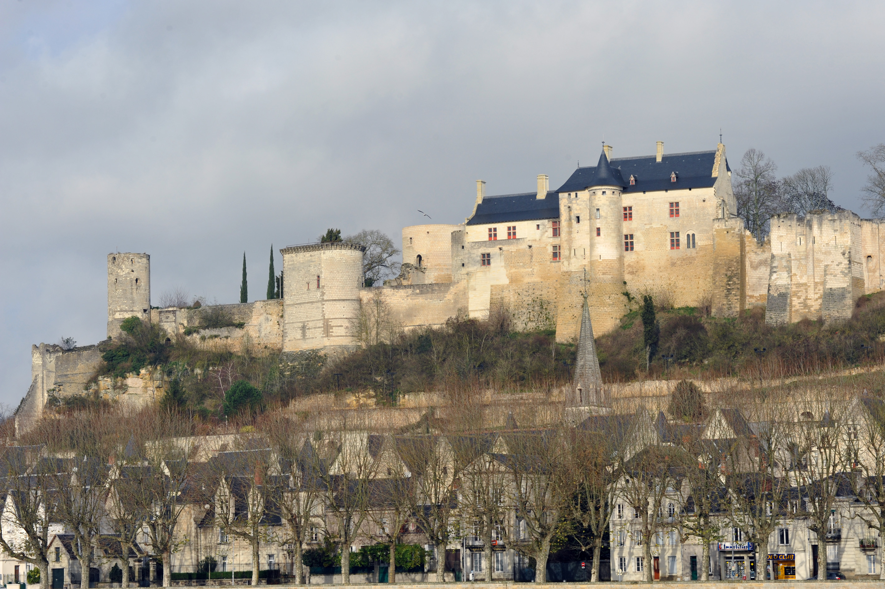 Vue du château de Chinon de la rive gauche de la Vienne, après la restauration de 2006-2009